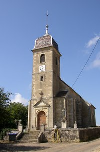 Eglise